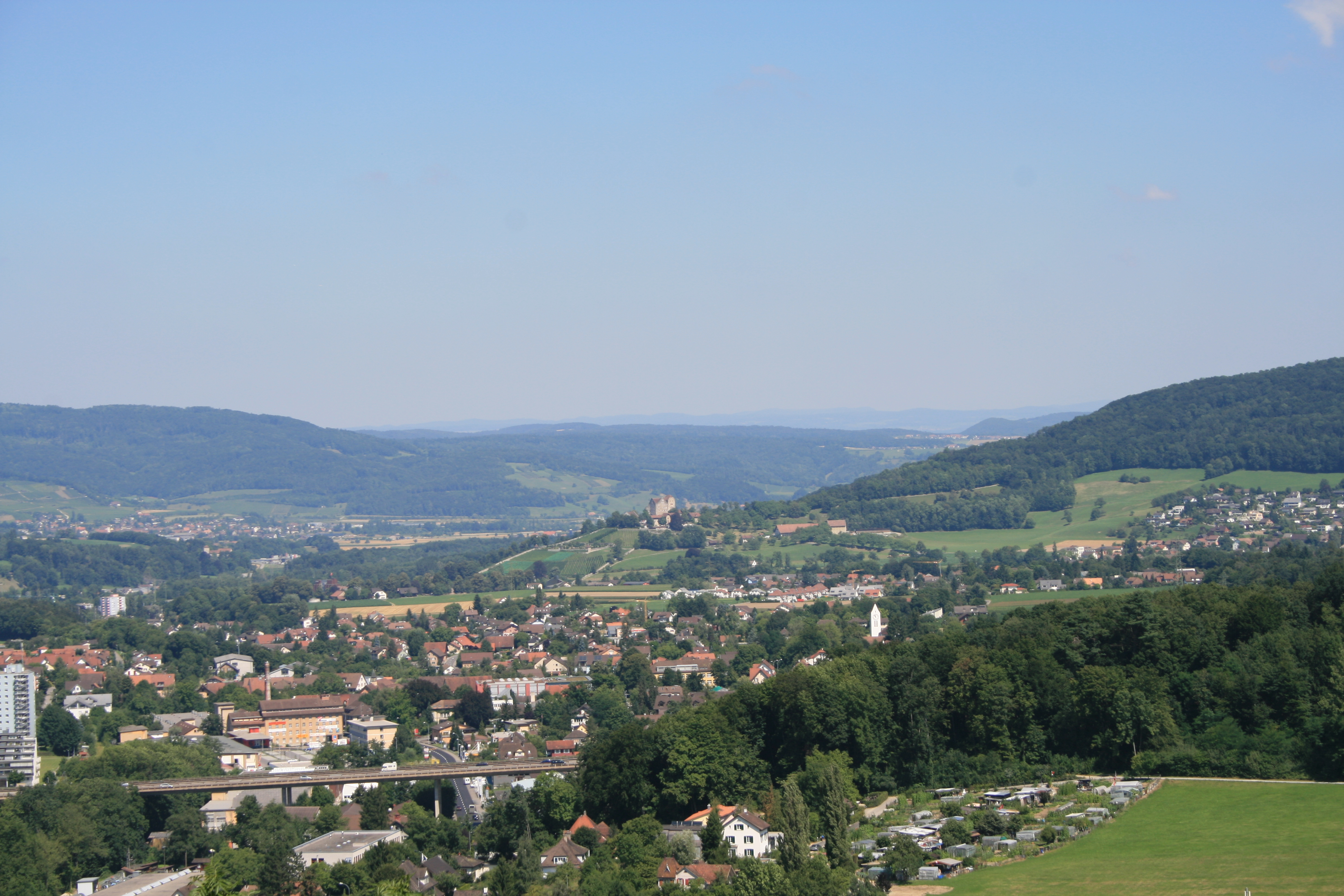 Blick von Schloss Lenzburg Richtung Niederlenz und Schloss Wildegg